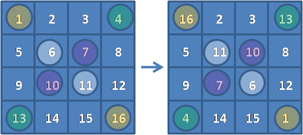 Magic square construction example for double even order.